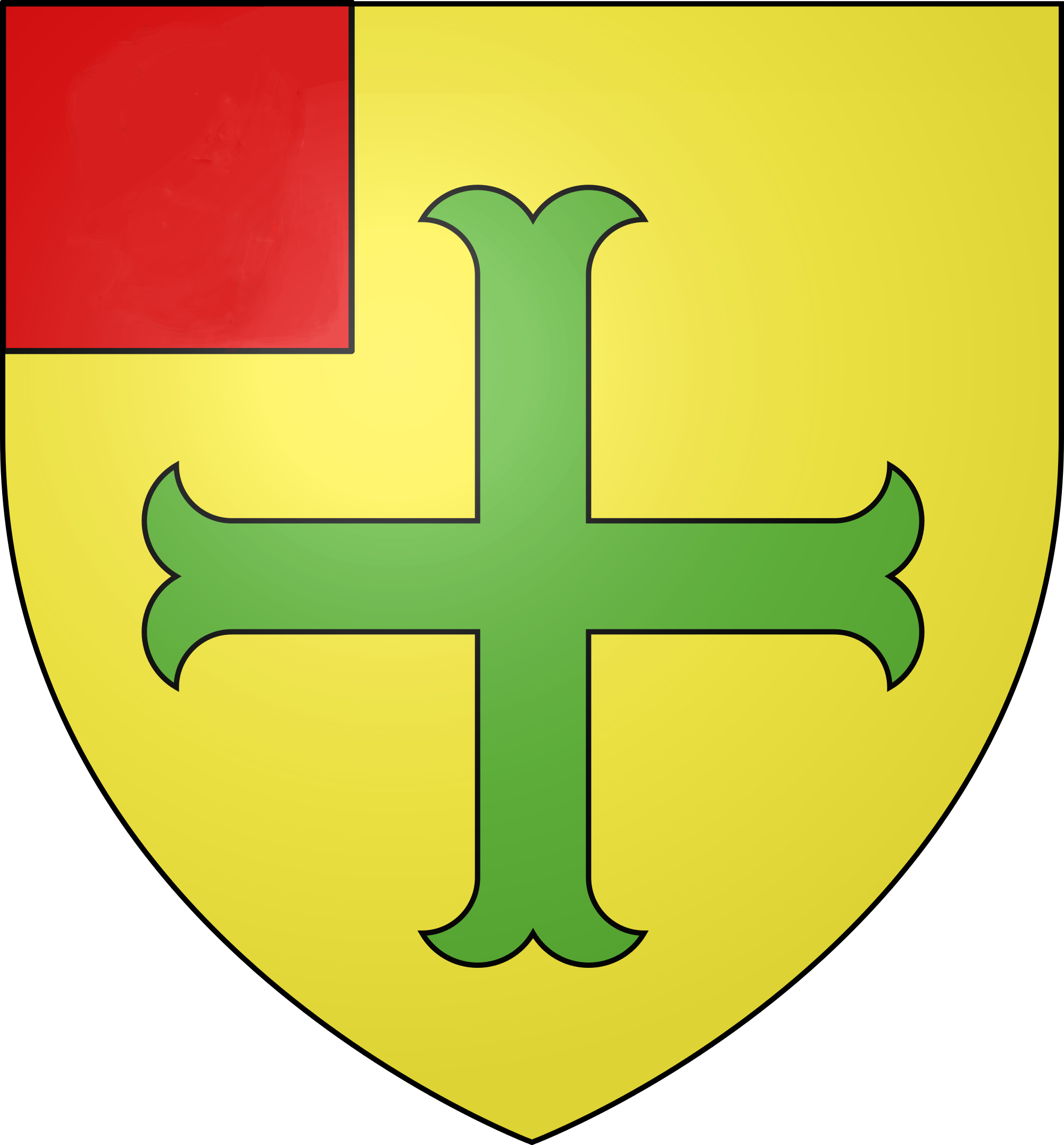 blason des chatelains de st-Phal.